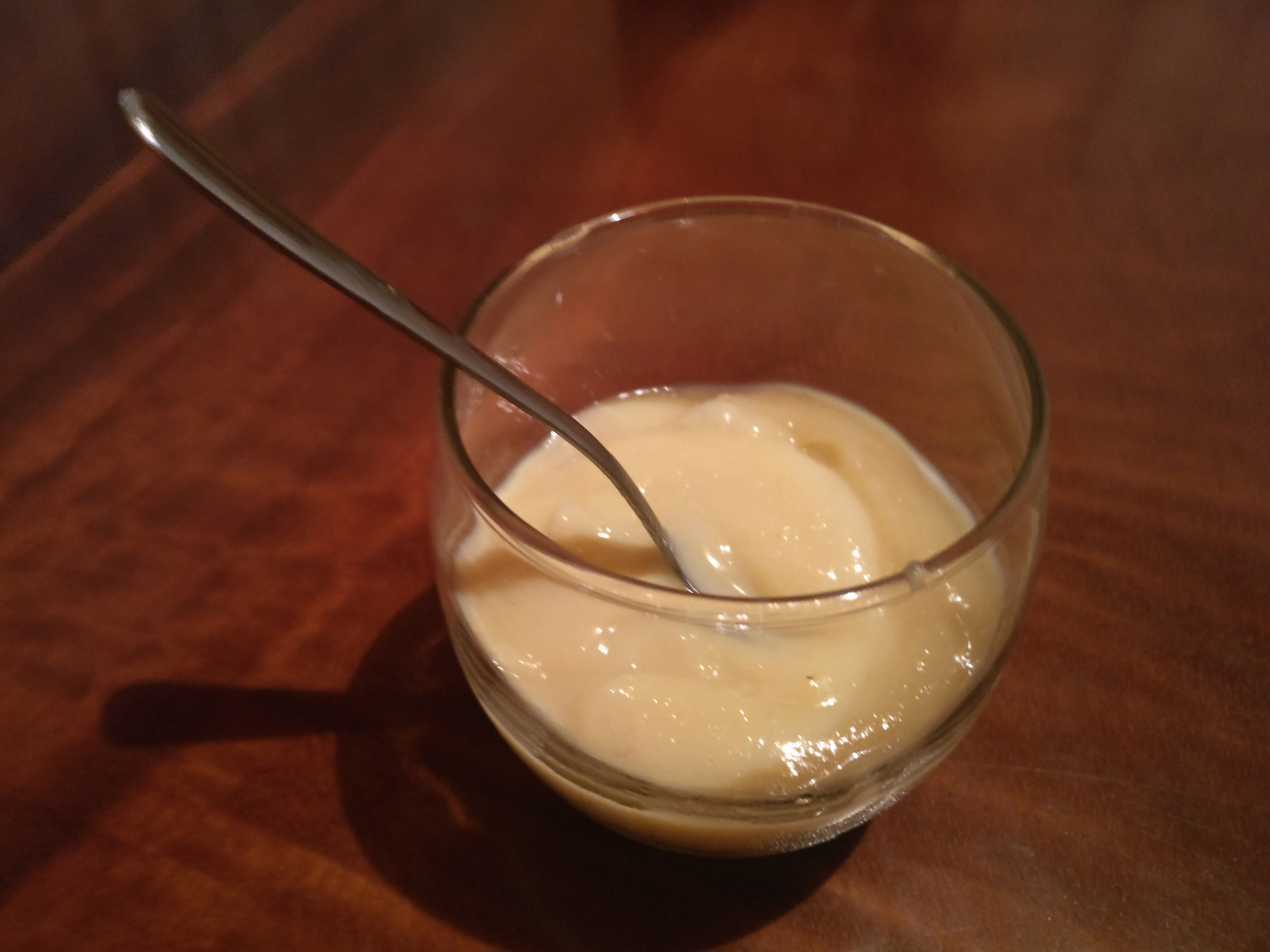 En Costa Rica, la mazamorra es un atol típico hecho a base de maíz tierno. Puede ser dulce (hecha con leche) o agria (sin ella).